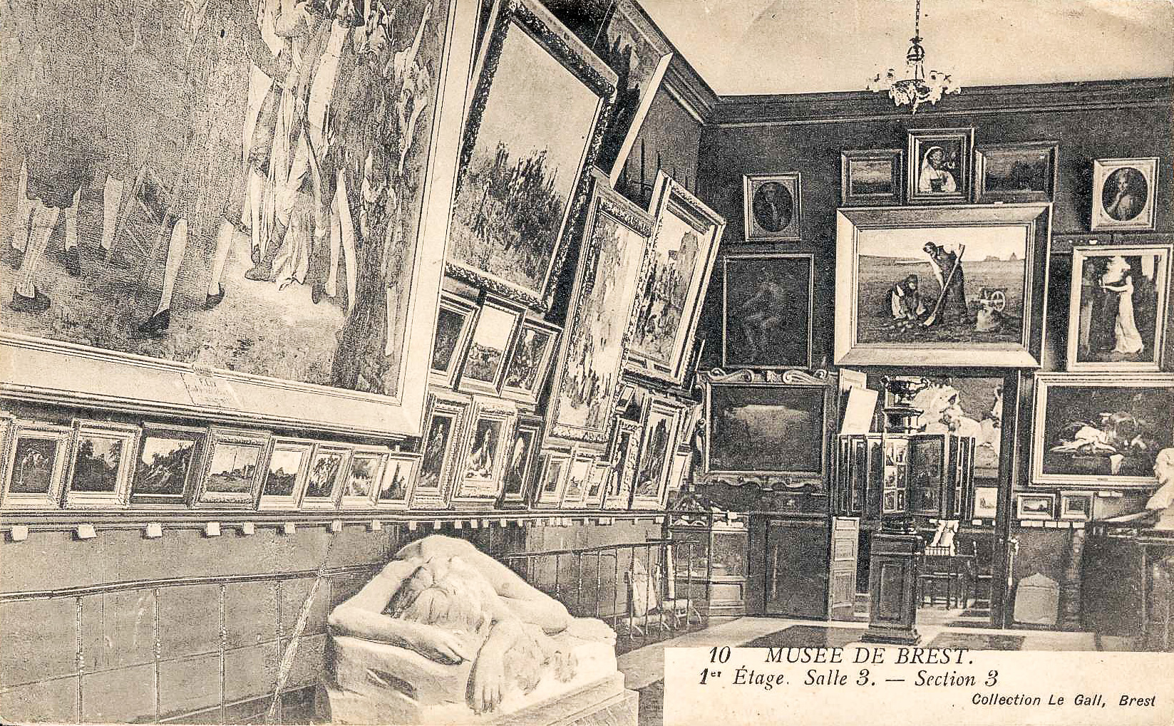 Intérieur de la Halle aux blés à Brest, qui comprenait un musée des beaux-arts, place Sadi-Carnot.